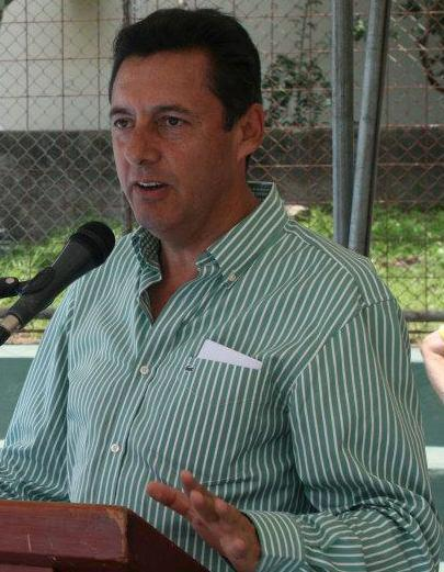 Antonio Álvarez Desanti dando discurso en La Florida de Hatillo